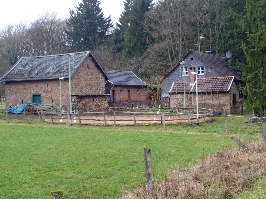 Forstdienstgehöft Alt-Süssendell bei Stolberg